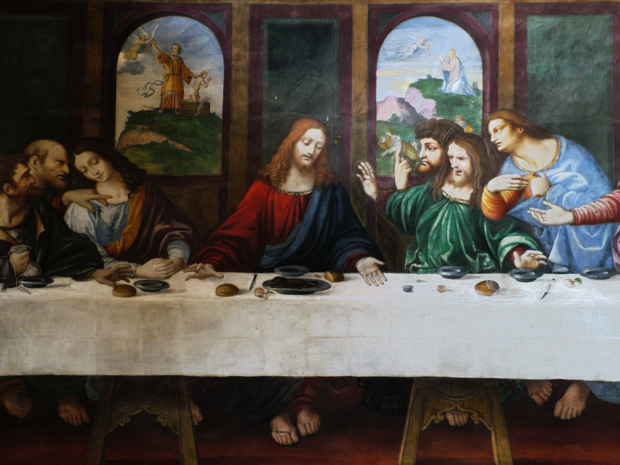 Ponte Capriasca - Chiesa di S. Ambrogio Ultima cena di Cesare da Sesto (allievo di Leonardo da Vinci) dettaglio